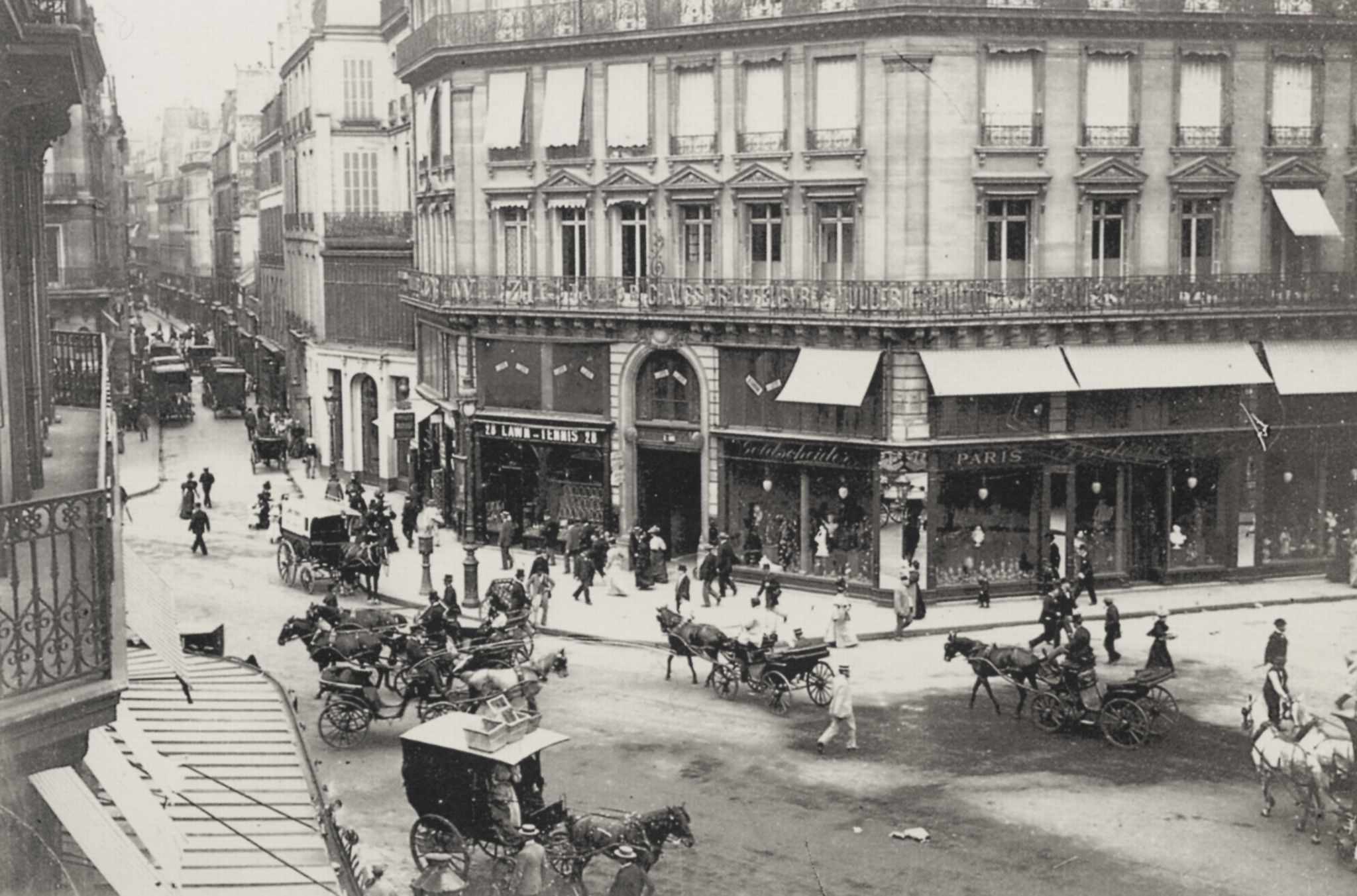 Zola, Francois Emile: Straßenkreuzung in Paris